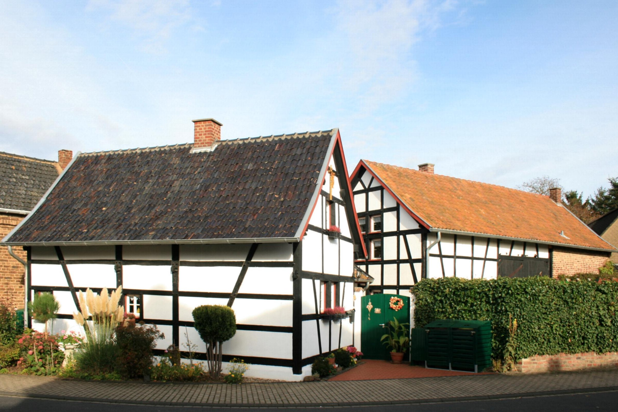 Der Fachwerkhof in Nörvenich-Pingsheim, Kompstr. 24